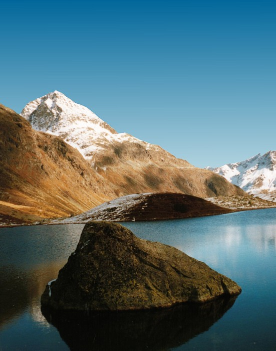 Bergmeer op de julierpas